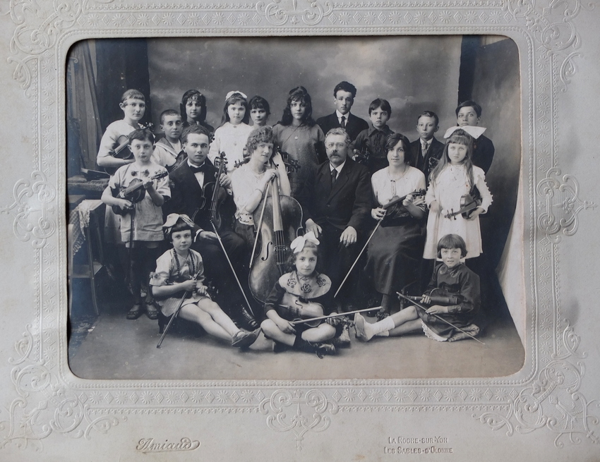 La famille de musiciens Casadesus, photographie Lucien Amiaud (1848-1922), La Roche-sur-Yon - Les Sables-d'Olonne. Vers 1910. Sur carton 34,5 x26,5 cm. cliché 29 x 17,5 cm. Collection privée.